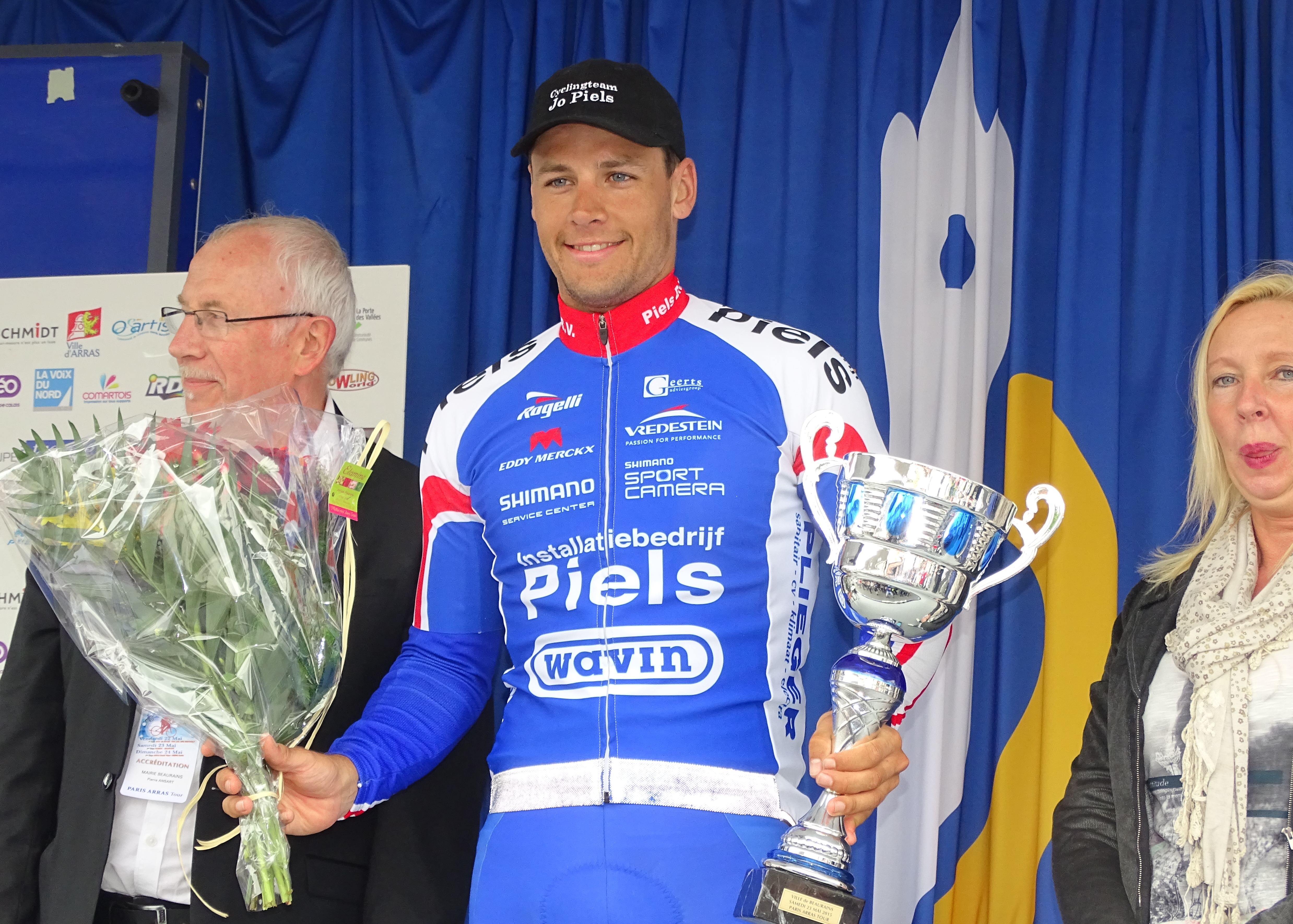 Reportage réalisé le samedi 23 mai 2015 à l'occasion de l'arrivée de la deuxième étape du Paris-Arras Tour 2015 à Beaurains, Pas-de-Calais, Nord-Pas-de-Calais, France. Depicted person: Jeff Vermeulen Depicted team: Jo Piels